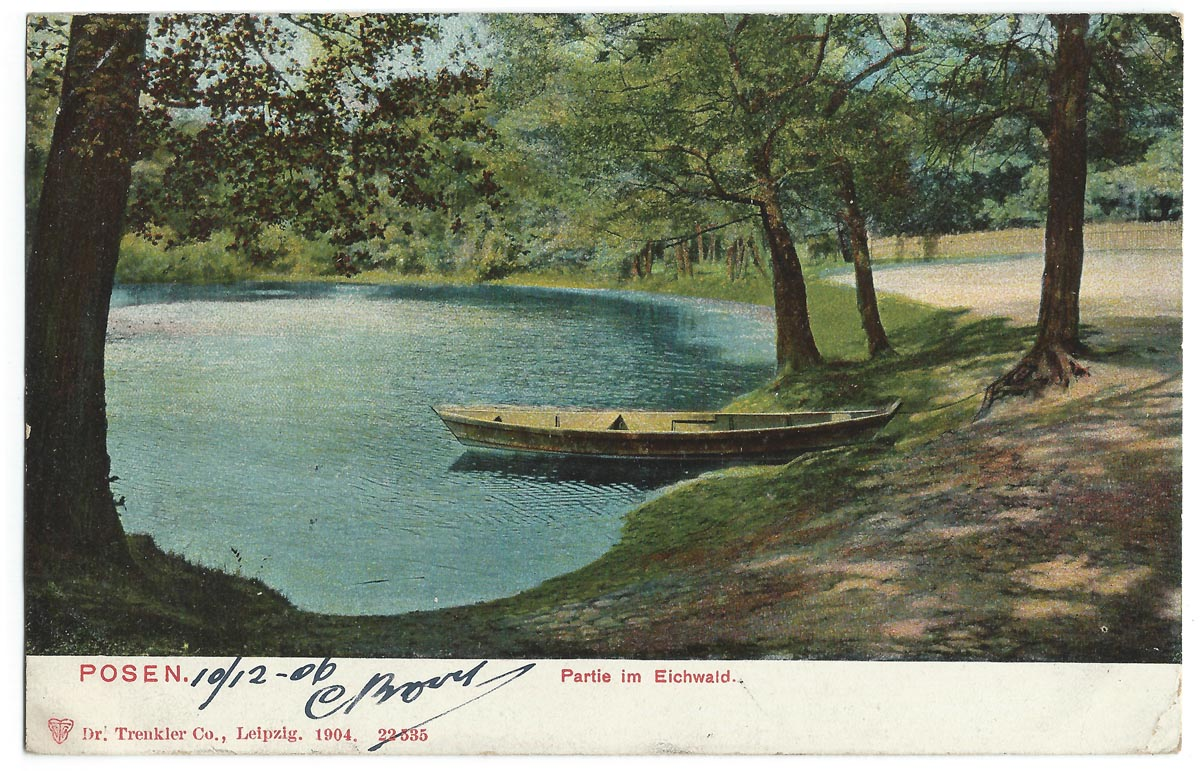 Vue de Francfort au début du XXe siècle (carte postale).